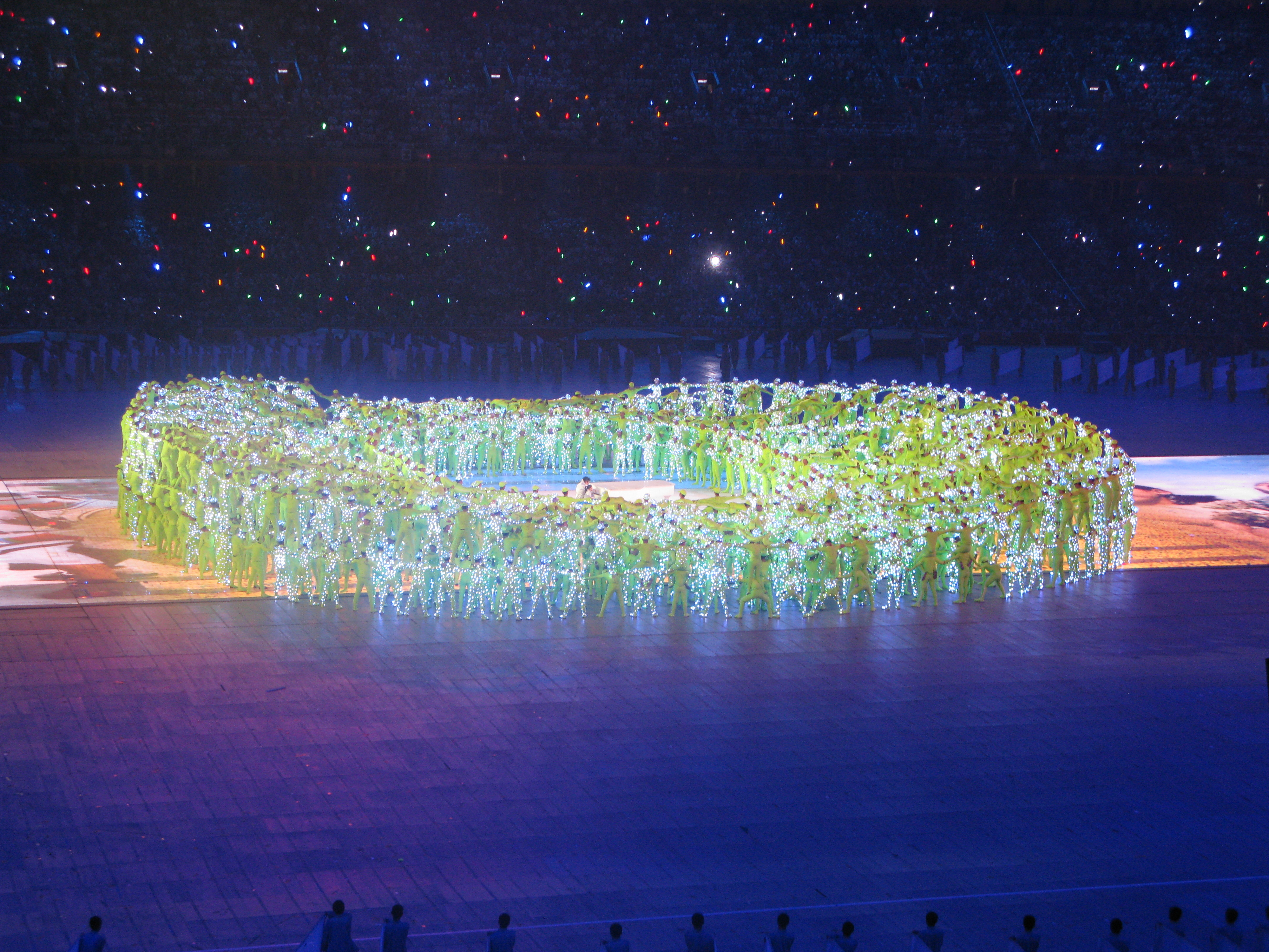 Cérémonie d'ouverture des Jeux Olympiques de Pékin en août 2008